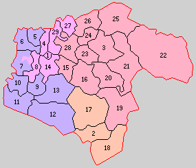 福島県田村郡の町村。